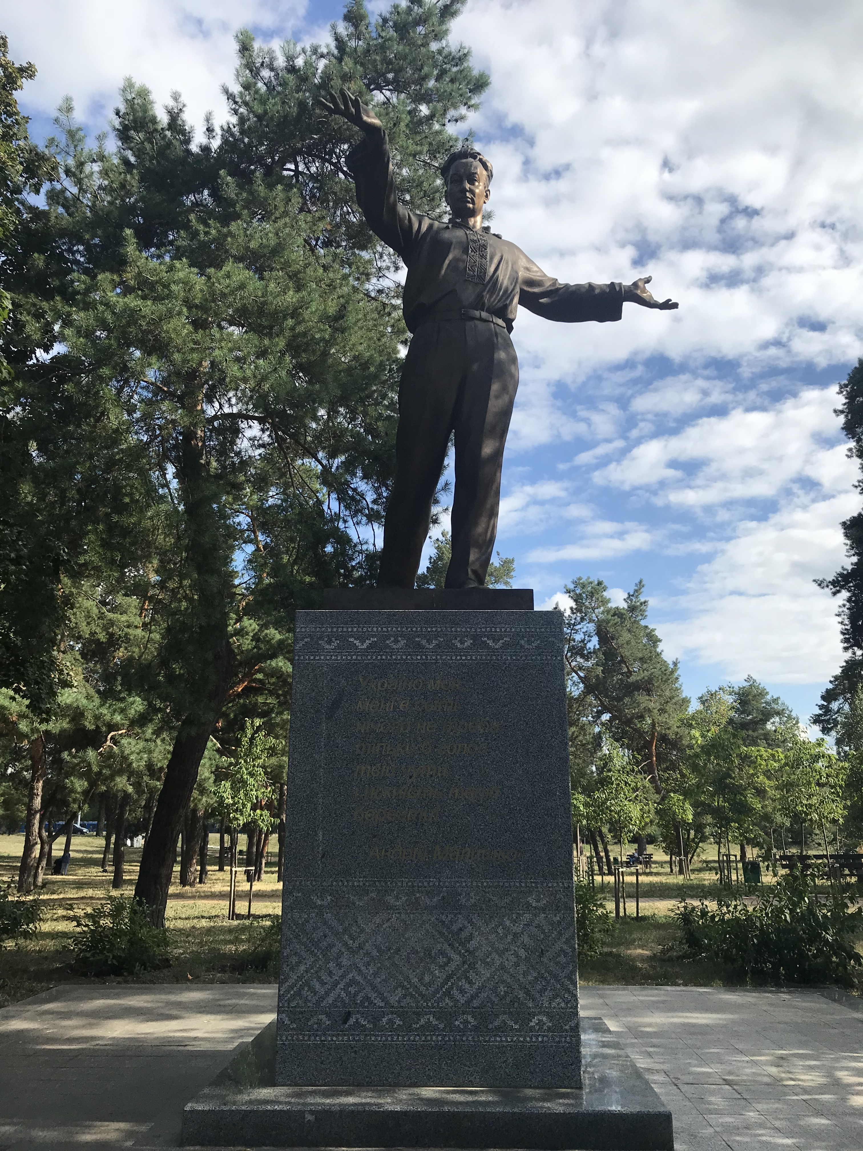 Памятник Андрею Малышко, Киев